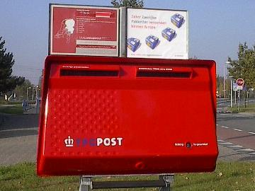 Brievenbus van TPG Post, eigen foto Categorie:Afbeelding_brievenbus